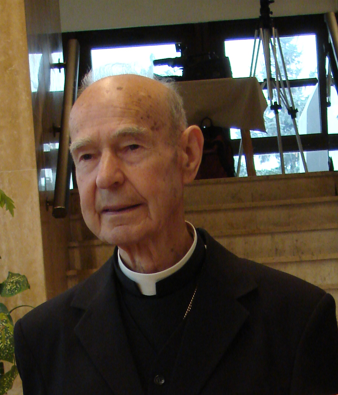 Jožef Smej, slovenski duhovnik, teolog, pesnik, pisatelj, prevajalec in mariborski rimskokatoliški škof, * 15. februar 1922, Bogojina.